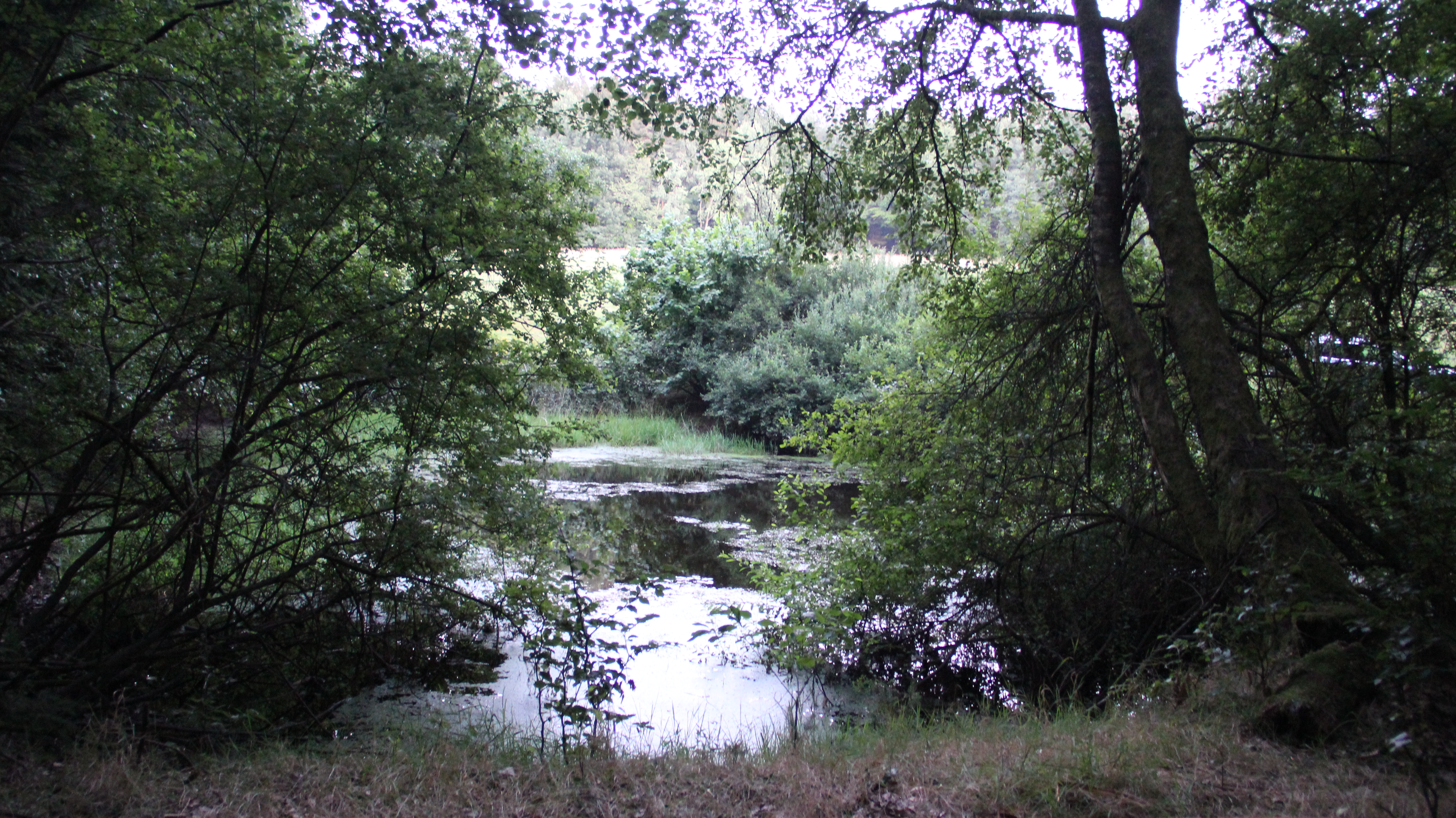 Teich unterhalb der Quelle des Ellenbachs in Rückerswind